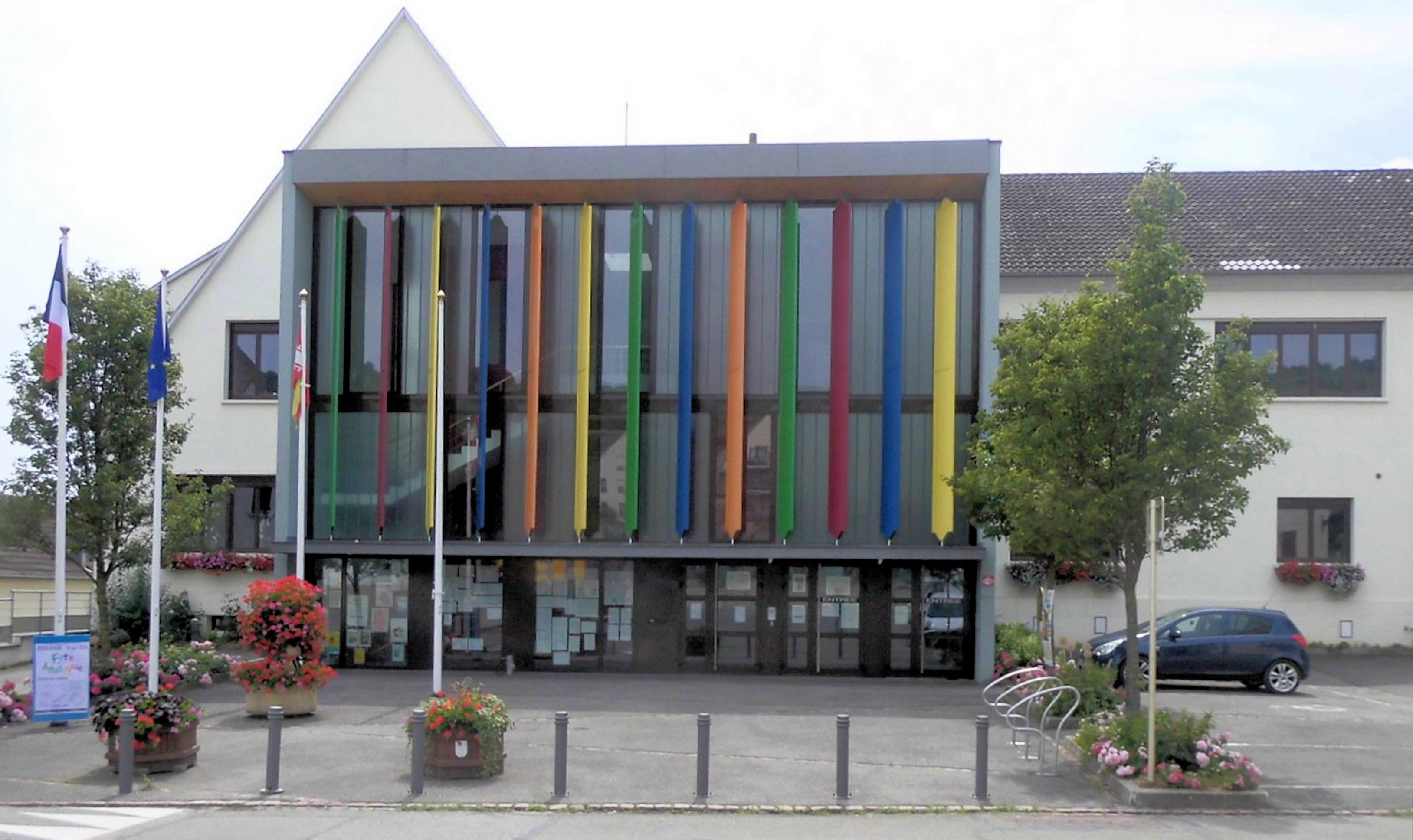 L'ancienne mairie de Sigolsheim, depuis 2016 mairie-déléguée de la commune de Kaysersberg Vignoble